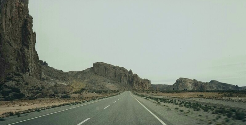 Ruta 25 en cercanías de Los Altares, provincia de Chubut.